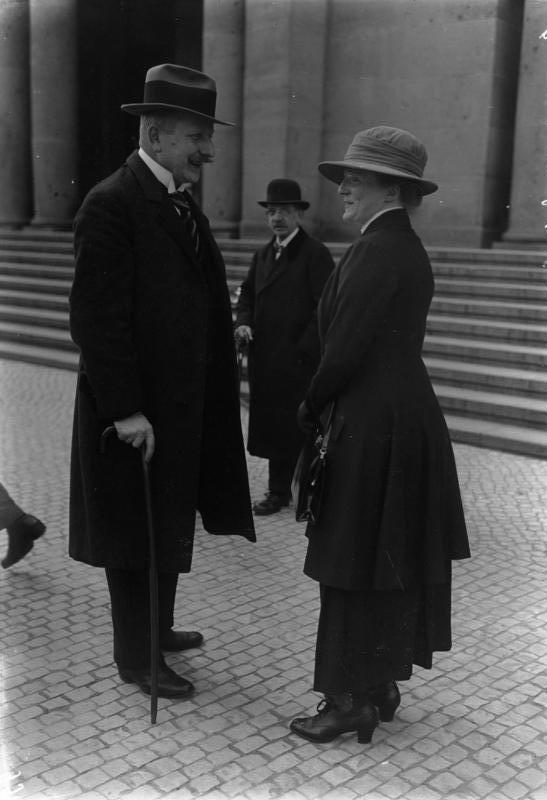 Die Reichstagseröffnung am 5. Januar 1925. Die erste Tagung nach der Auflösung im neuen Jahr. Reichstagsabgeordneter Wulle, Deutsch-national, begibt sich zur Sitzung.